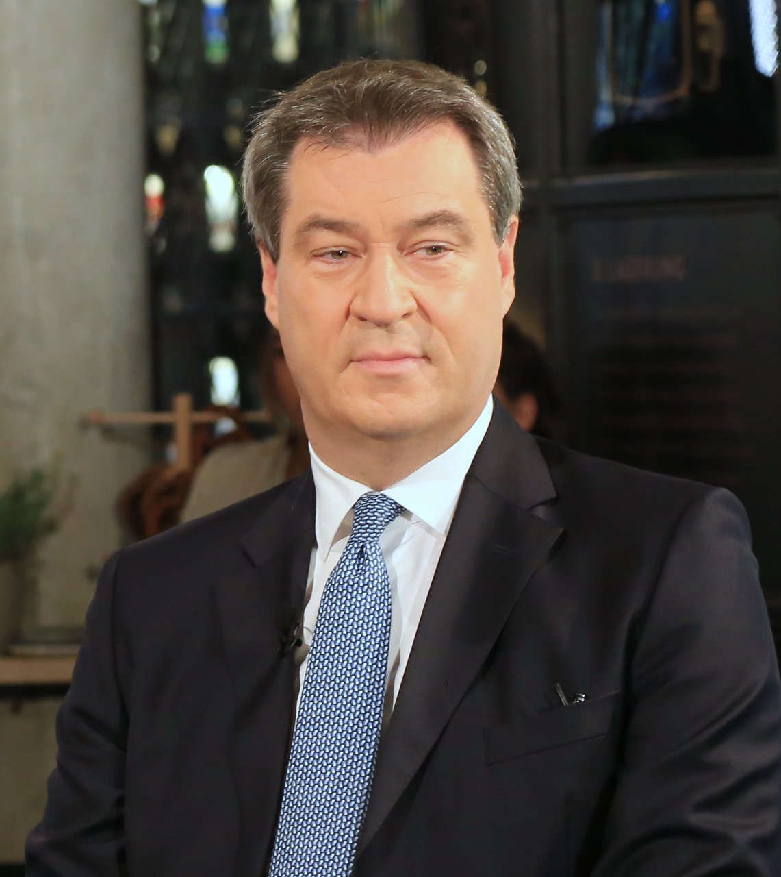 Dr. Markus Söder, deutscher Politiker (CSU) Titel des Werks "Dr. Markus Söder (CSU)"